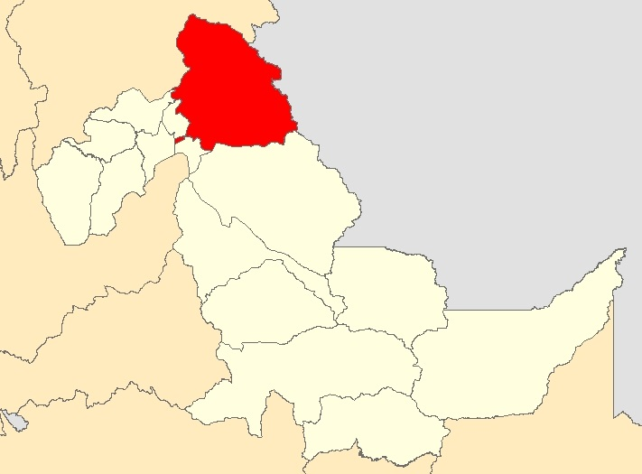 Mapa distrito Callería,Ucayali - Perú